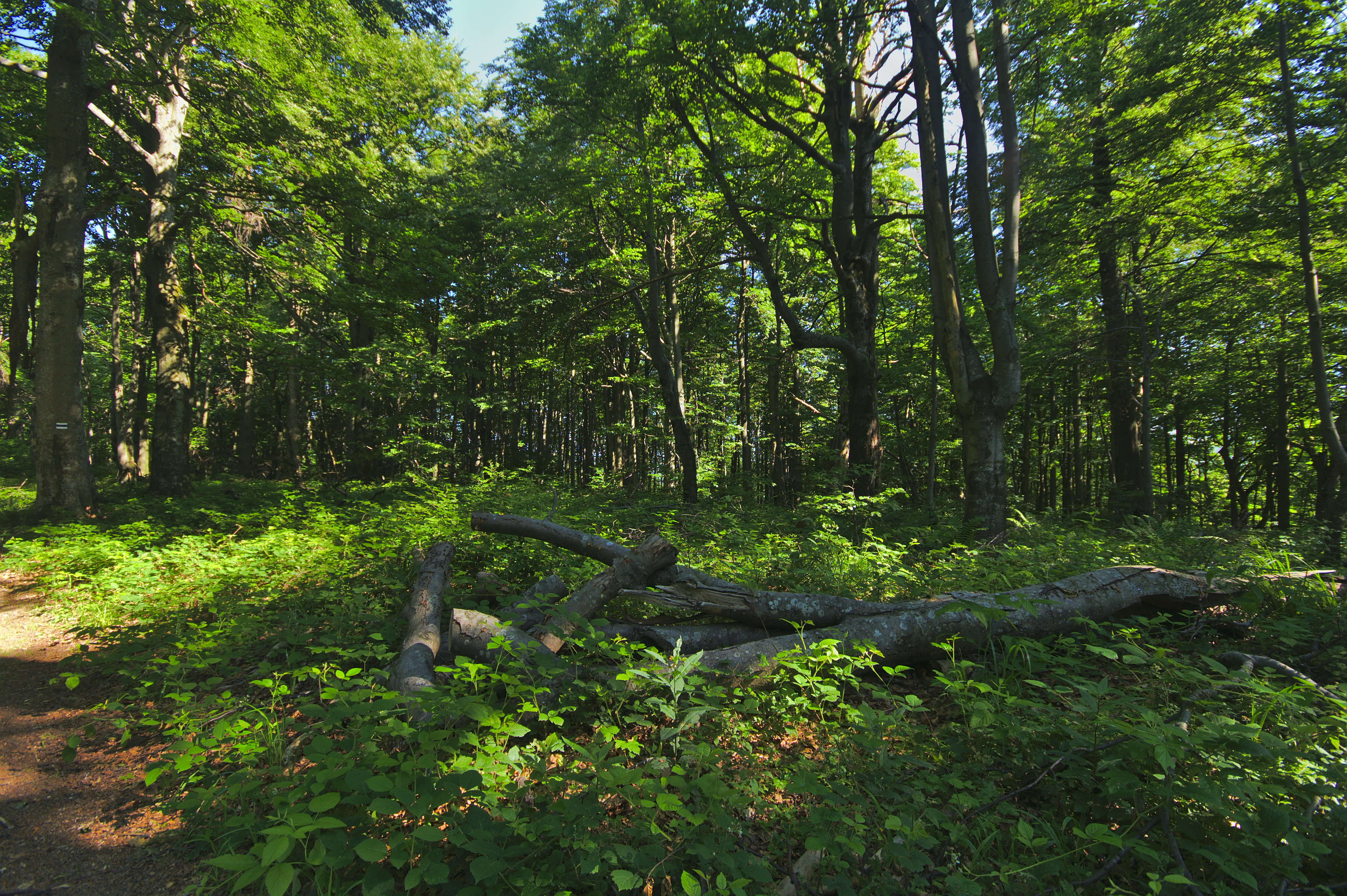 Prírodná rezervácia Borsukov vrch, Národný park Poloniny